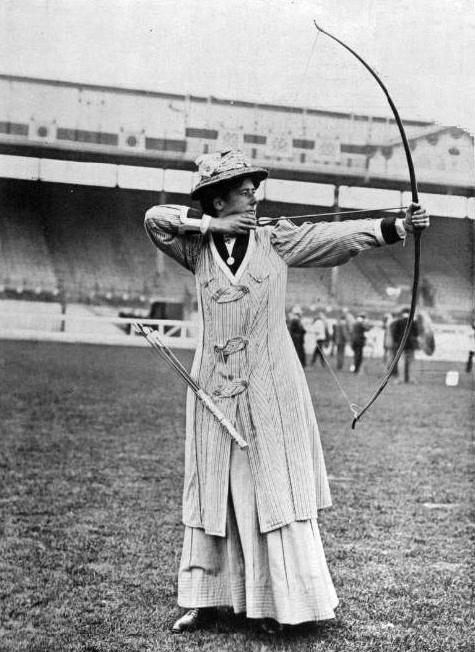 Lottie Dod, vice-championne olympique de tir à l'arc en 1908.